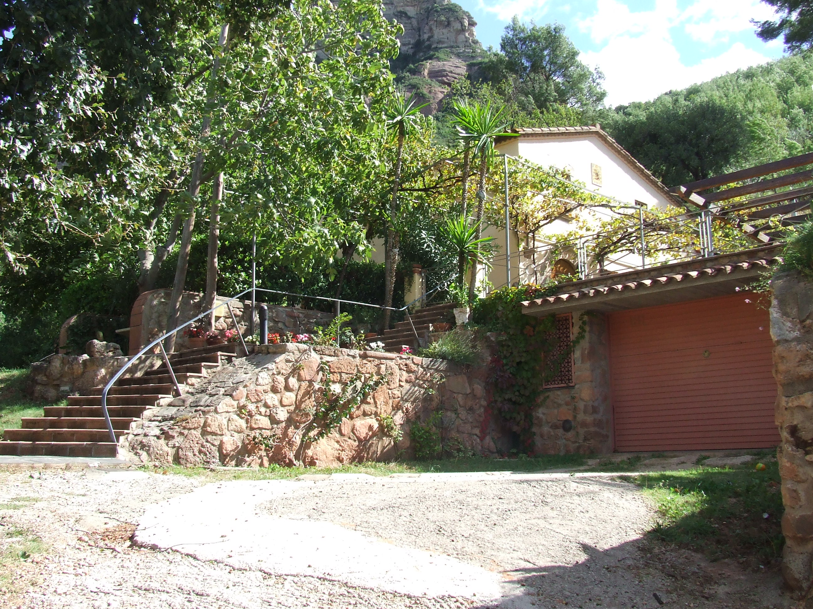 Can Tabola (Riells del Fai, Bigues i Riells, Vallès Oriental)